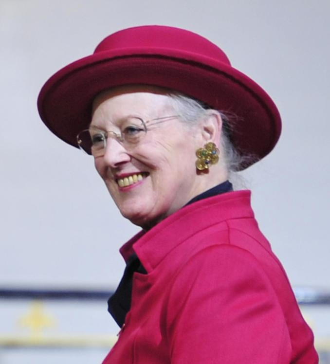 Dronning Margrethe ved bispevielse af Henning Toft Bro i Budolfi Kirke, Aalborg.